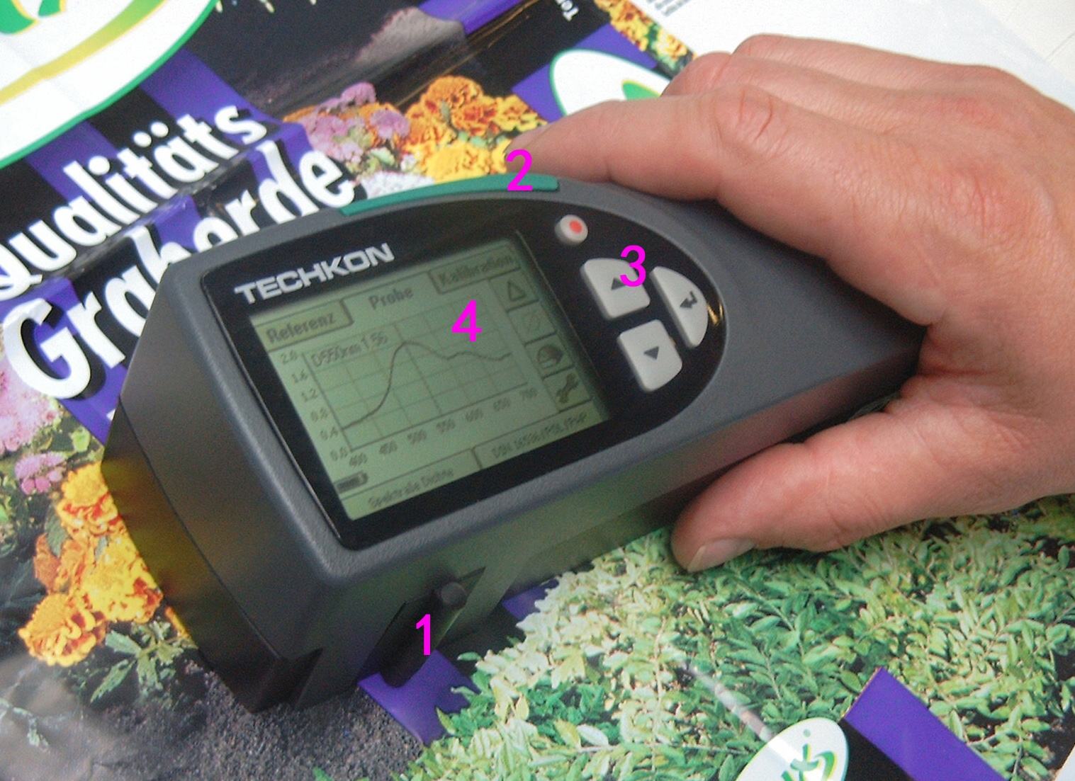 Spektraldensitometer für Einzelmessungen. 1 – senkrechte Messoptik, unter der sich das in einem Winkel von 45° beleuchtete Messobjekt (hier eine bedruckte Kunststofffolie mit violetter Sonderfarbe) befindet; 2 – Taste für das Auslösen der Messung; 3 – Menütasten; 4 – Diplay (zeigt die Dichtekurve der Sonderfarbe).